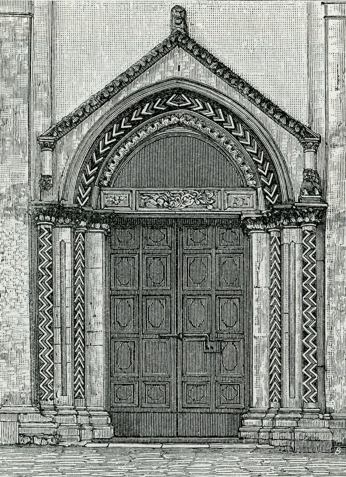 Chieti: porta dell’ex chiesa del Carmine (xilografia di Barberis 1898).